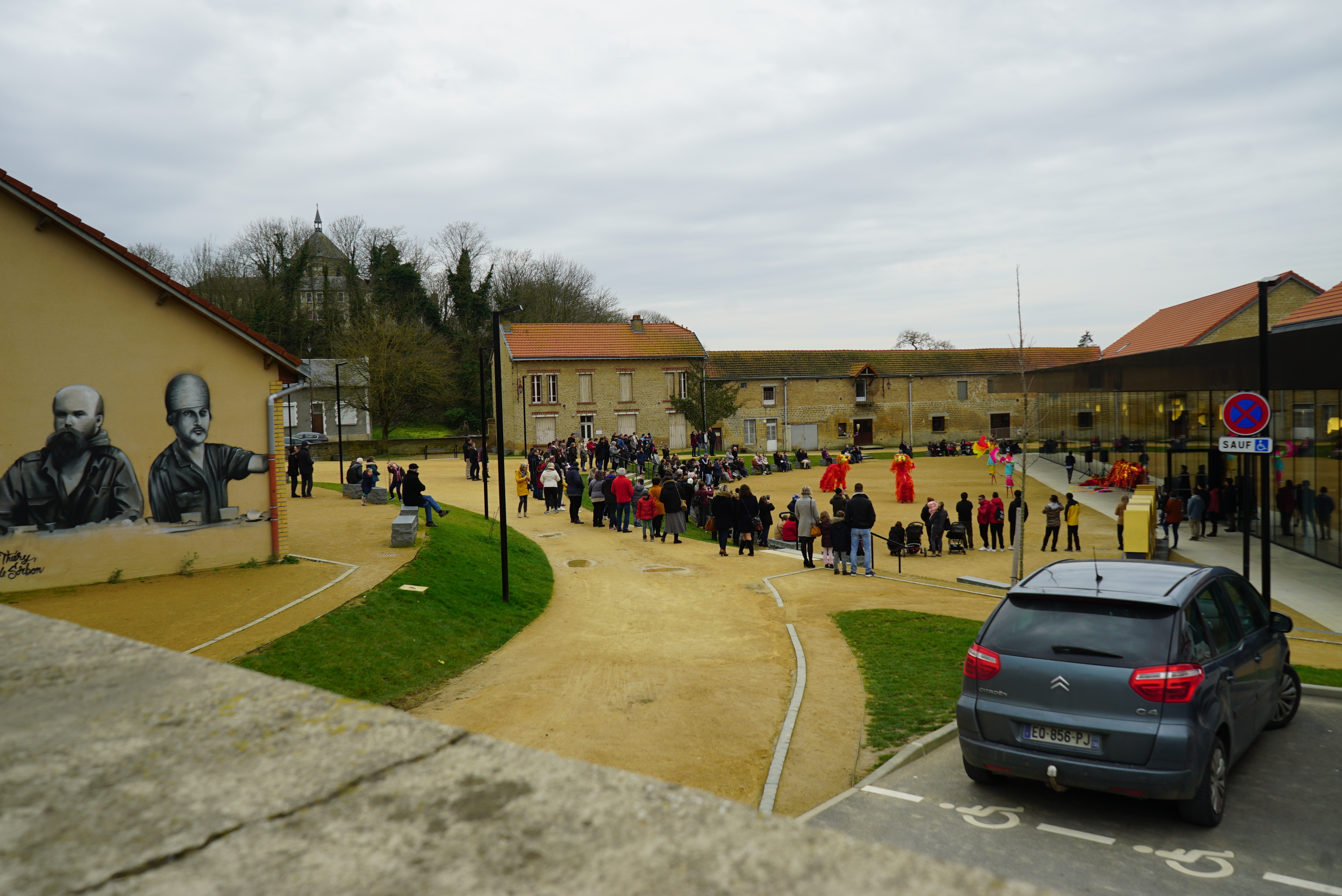 le complexe multi roles AGORA à Rethel.